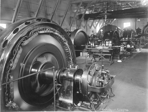 Kraftstasjonen i Fagerli. 1915 SG.F.10009-0155